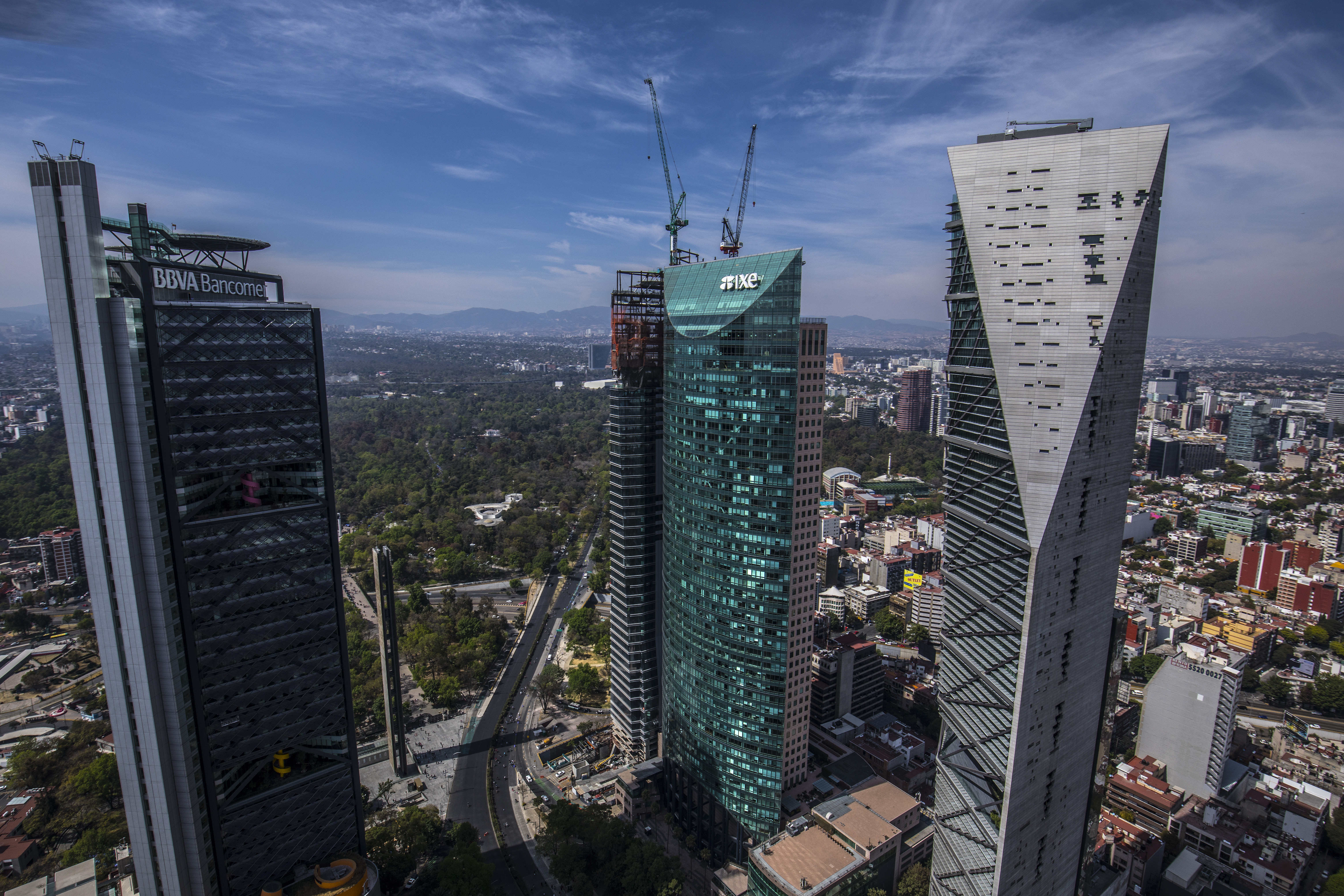 Fotografías de la Ciudad de México desde el aire.